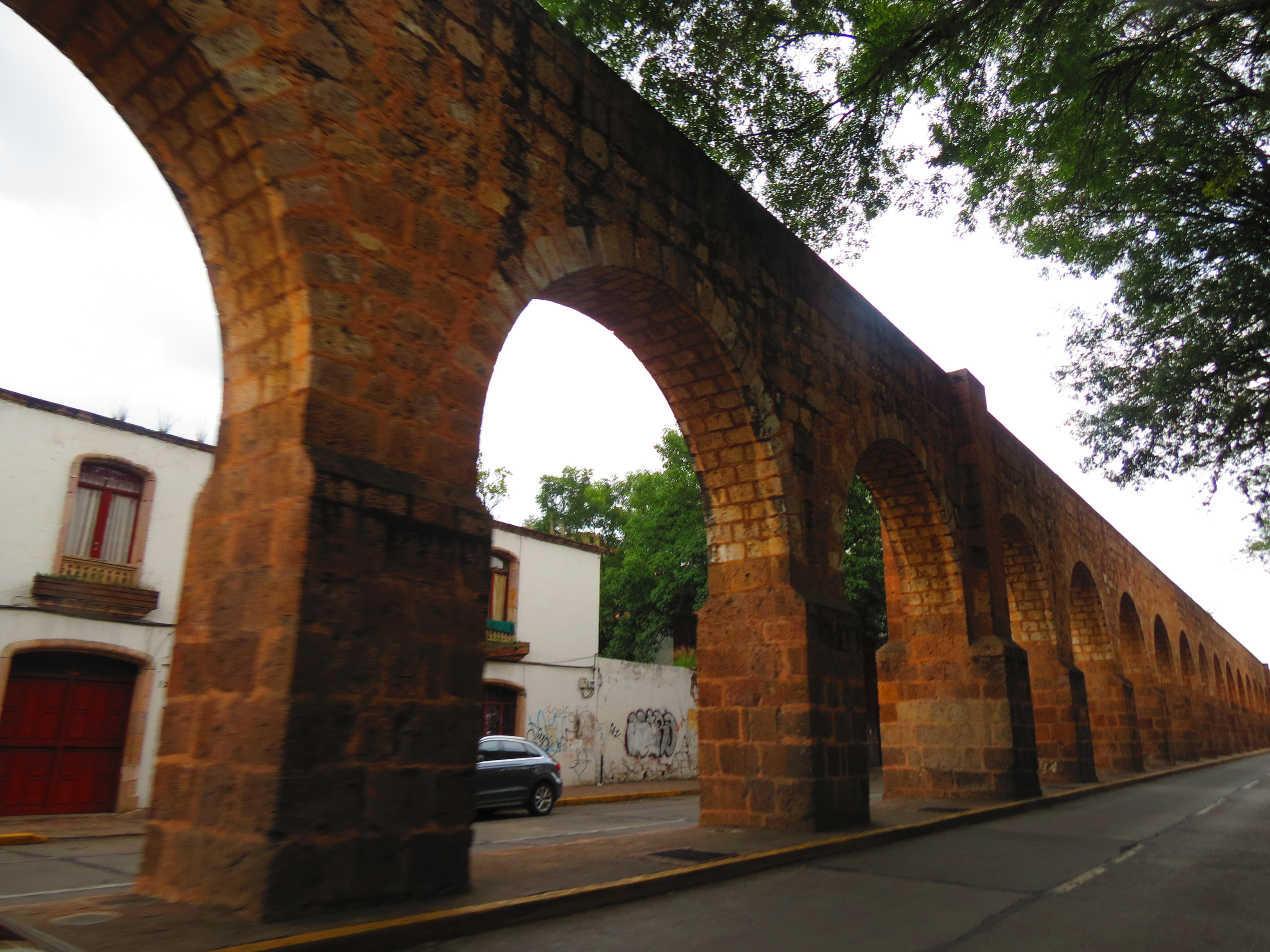 Vista del acueducto de Morelia